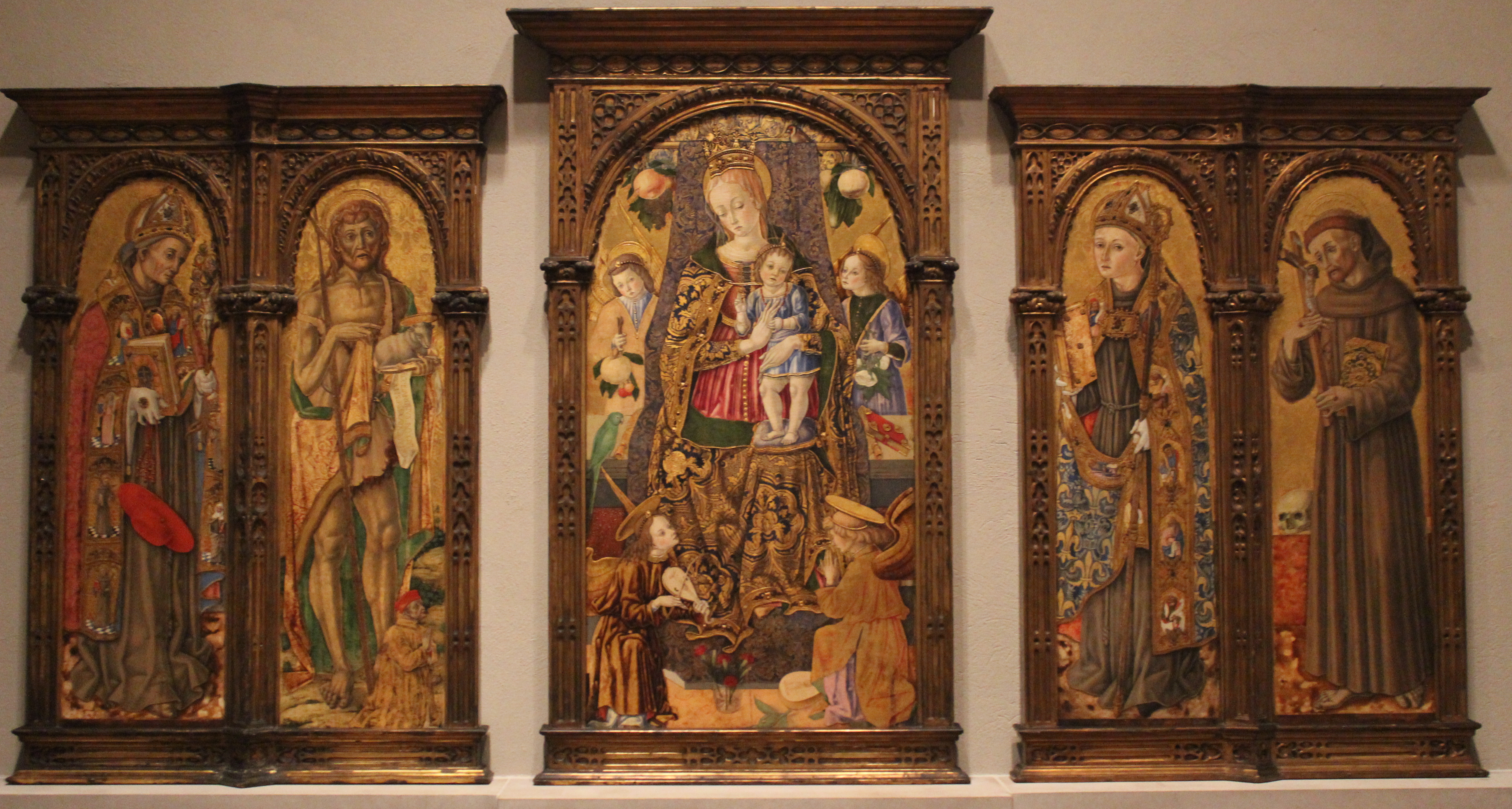 Vittore Crivelli. Virgen con Niño y santos. Philadelphia Museum of Art